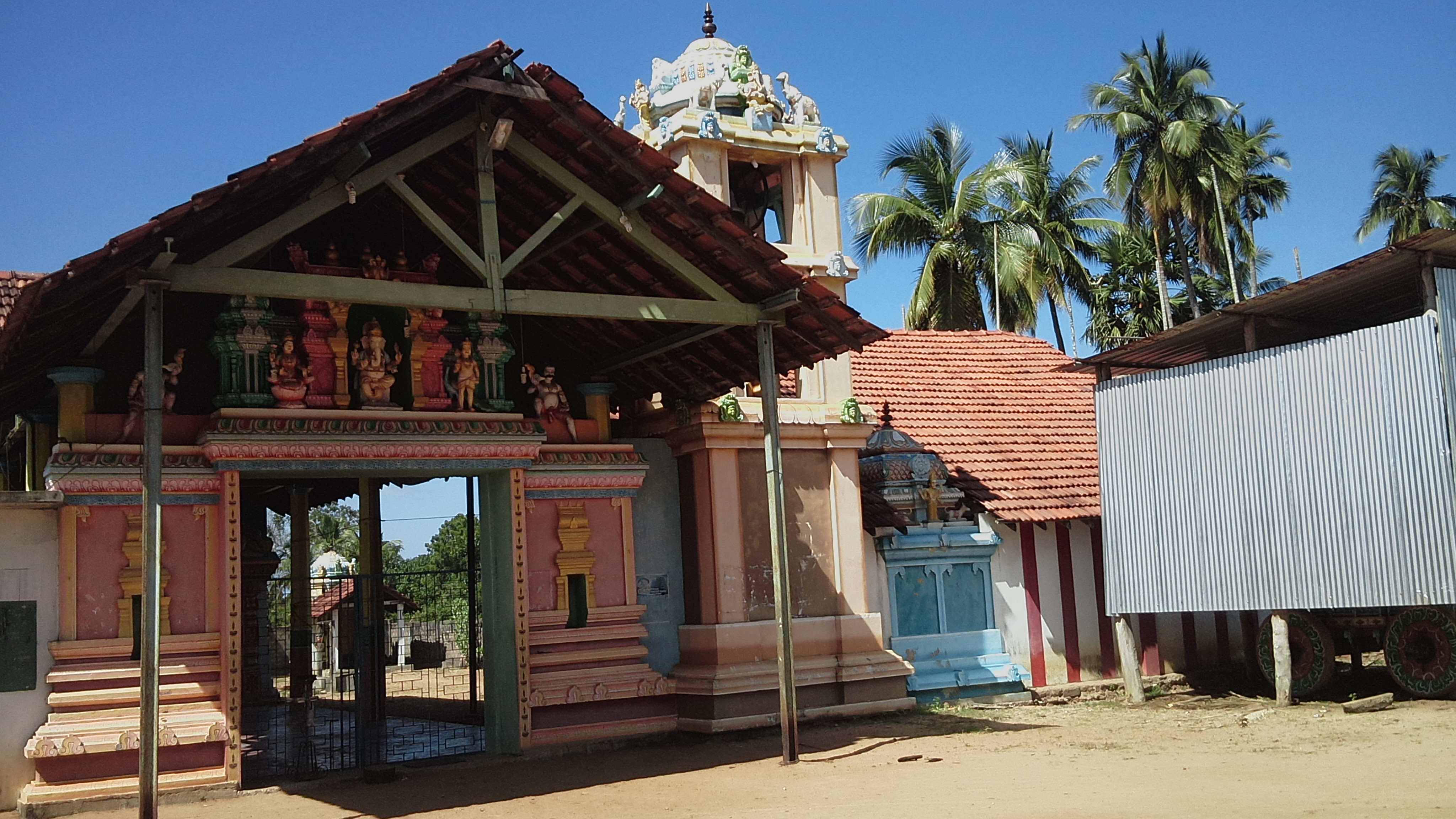 sothi vinajakar